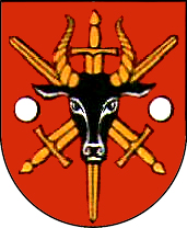 Herb Gębic